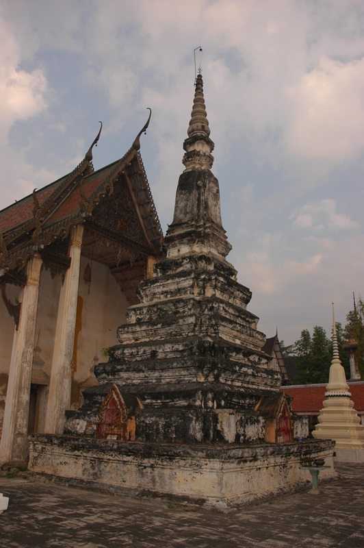 เจดีย์เหลี่ยมย่อมุมสิบสองสมัยพระนารายณ์ อยู่บนลานหน้าพระอุโบสถที่มีพระระเบียงล้อมรอบ วัดบางแคใหญ่